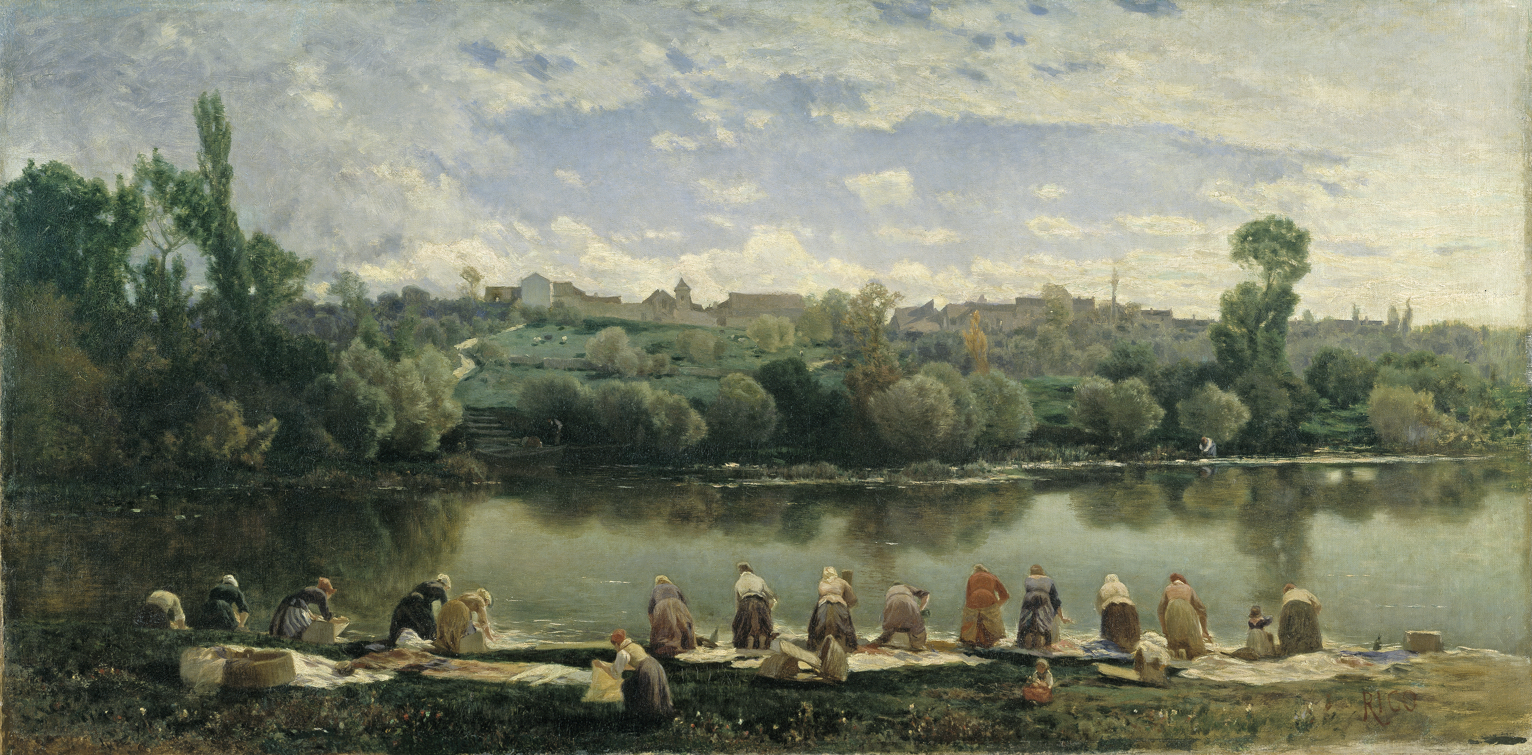 Lavanderas de la Varenne. Hacia 1865. Óleo sobre lienzo, 85 x 160 cm.